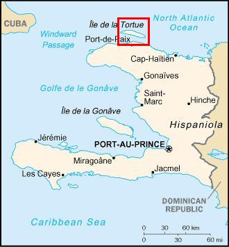 De ligging van het eiland Île de la Tortue bij Haïti. Dit is een bewerking die ik zelf gemaakt heb van een kaartje uit het CIA World Factbook.